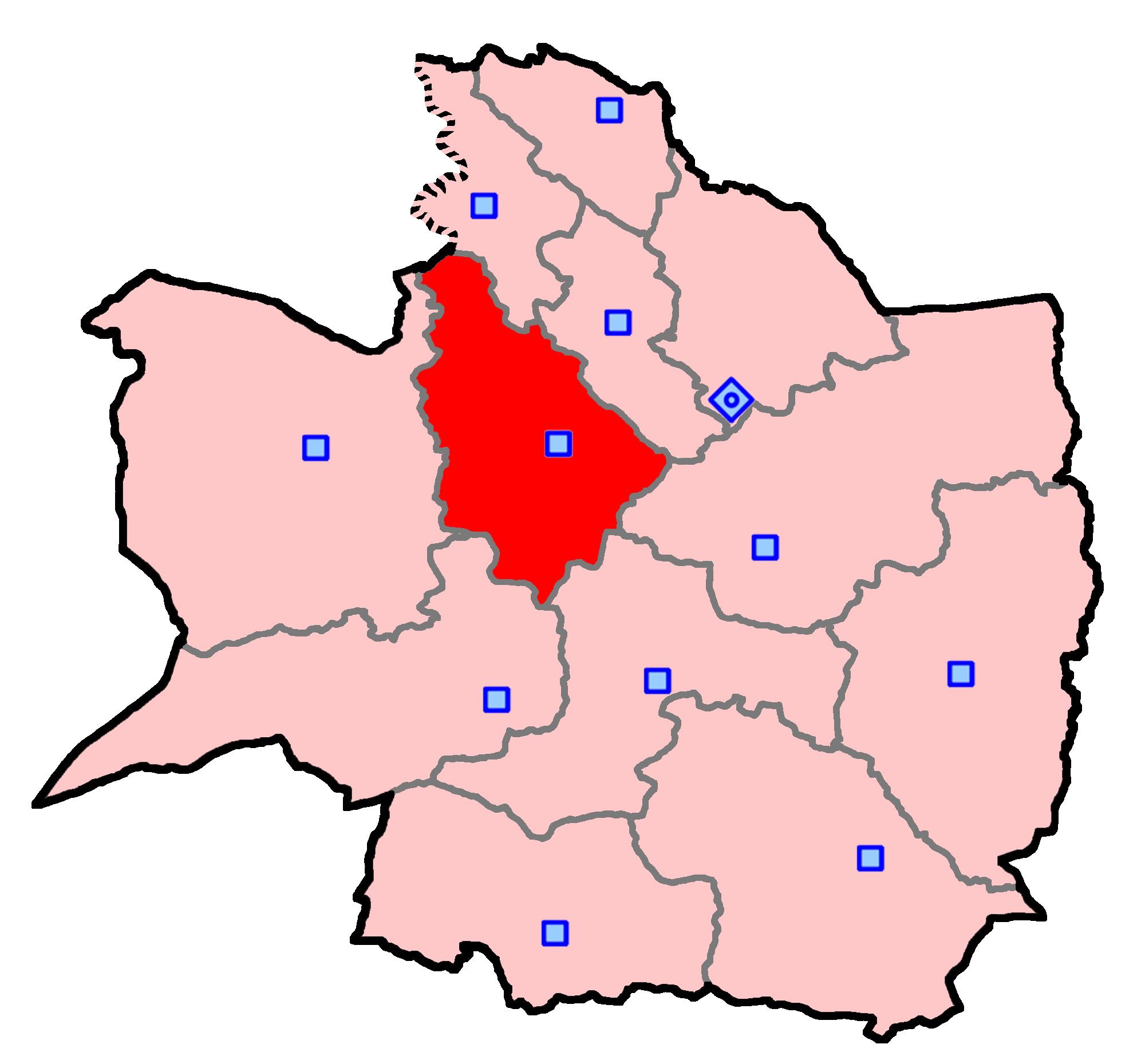 حوزهٔ انتخاباتی نیشابور برای انتخابات مجلس شورای اسلامی